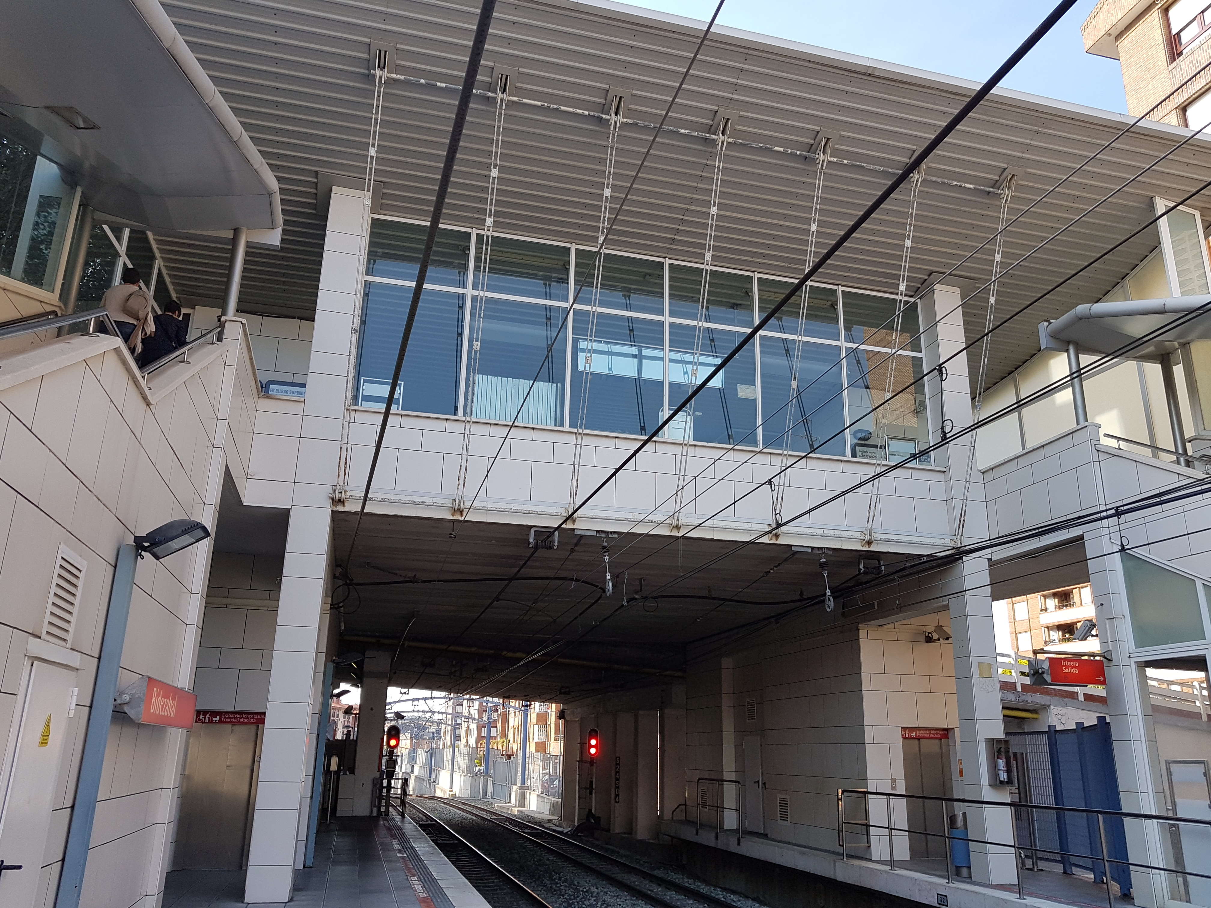 Estación de Bidezabal.